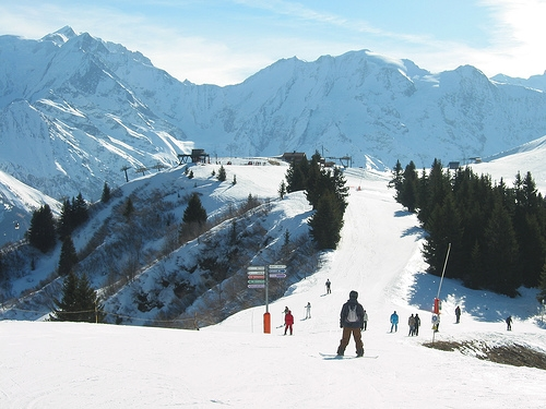 Megeve 2007.